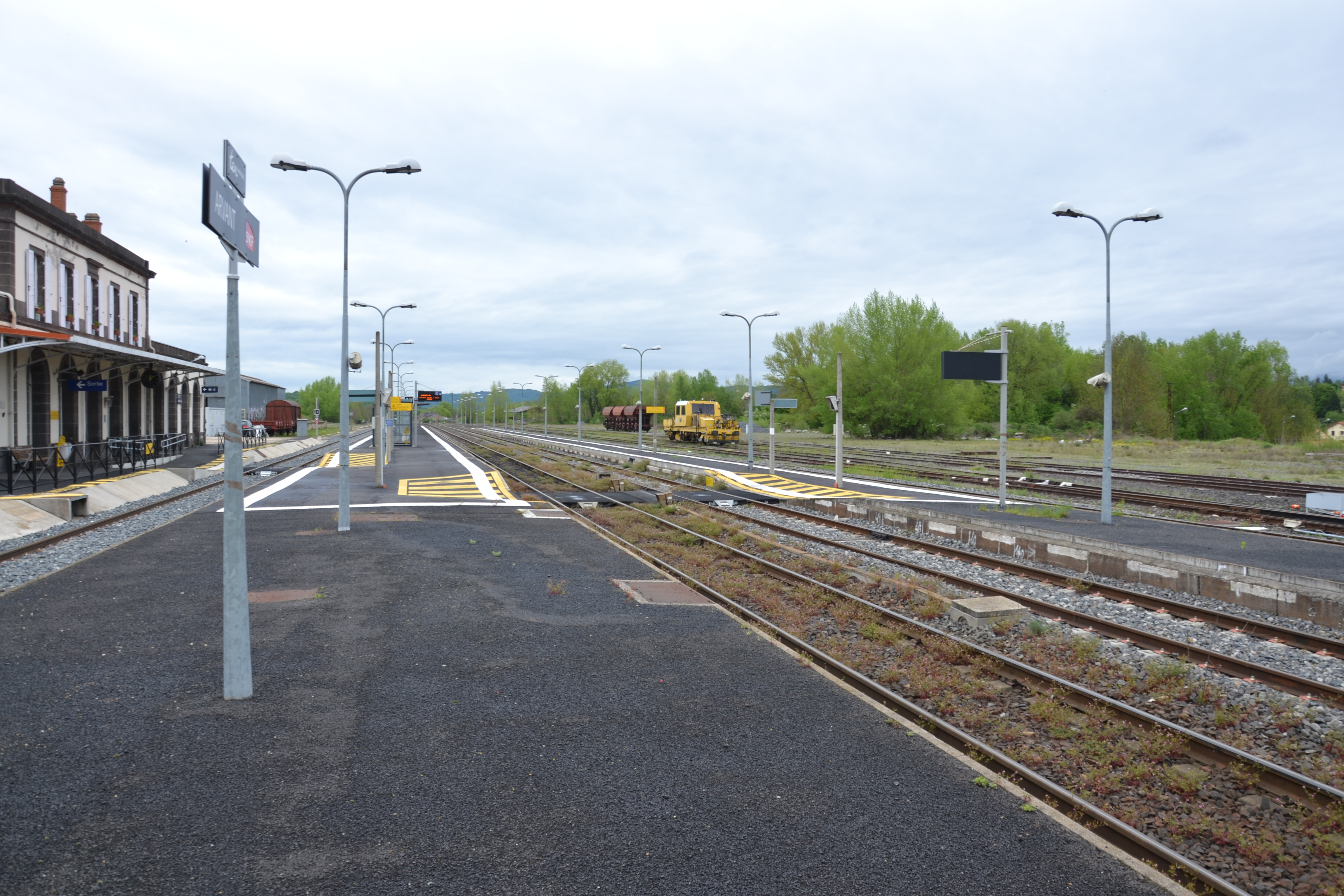 Installation des quais et voies